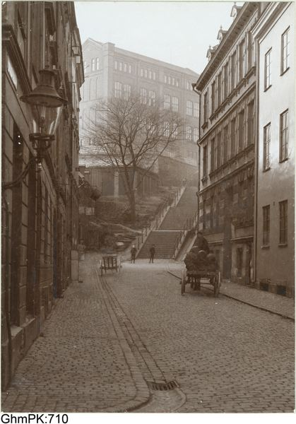 Spannmålsgatan med Kvarnbergsskolan i fonden. Nordstaden i Göteborg cirka 1902. Bildsamlingen, Göteborgs stadsmuseum, GhmPK-710.